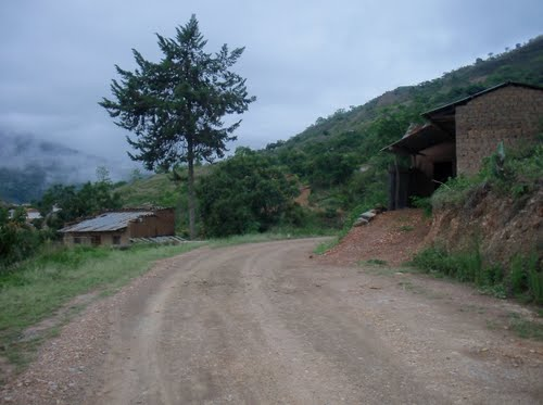 Bolivia